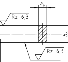 Rauheit laut DIN 50125